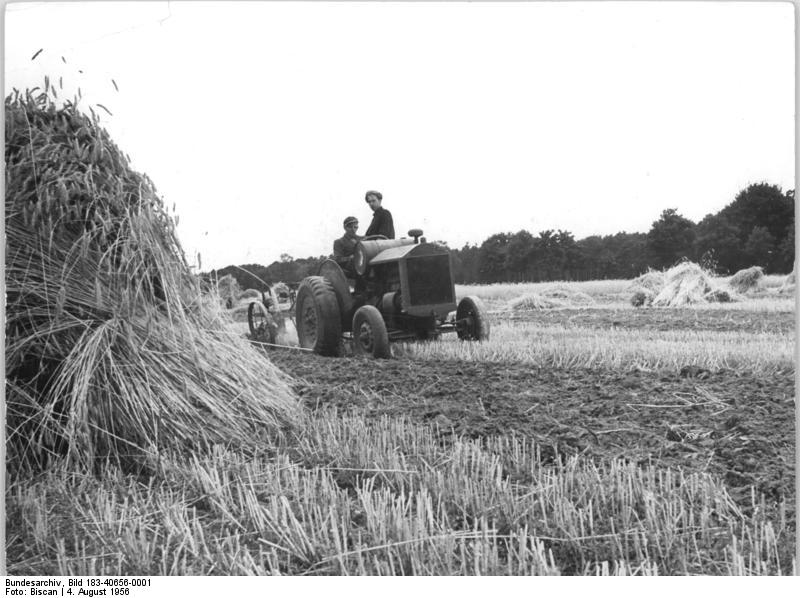 Elversdorf, Stoppelumbruch Zentralbild Biscan 4.8.1956 Der Mahd folgt die ZwischenfruchtDer werktätige Einzelbauer Arnold Steding in Elversdorf, Kreis Tragerhütte, hat sich vorgenommen in diesem Jahr beim Zwischenfruchtanbau keine Stunde Zeit zu verlieren. Kaum ist der Roggen gemäht, wird der Boden schon für den Anbau von Senf und Wickgemenge fertiggemacht. Bauer Steding hat sein Raps- Milch- und Eiersoll in diesem Jahr schon erfüllt. Der alte Traktor, den er wieder "auf die Beine gestellt" hat, hilft ihm, die Zwischenfrucht ohne Zeitverlust anzubauen. UBz: Bauer Steding beim Stoppelumbruch auf dem eben abgeernteten Roggenfeld.